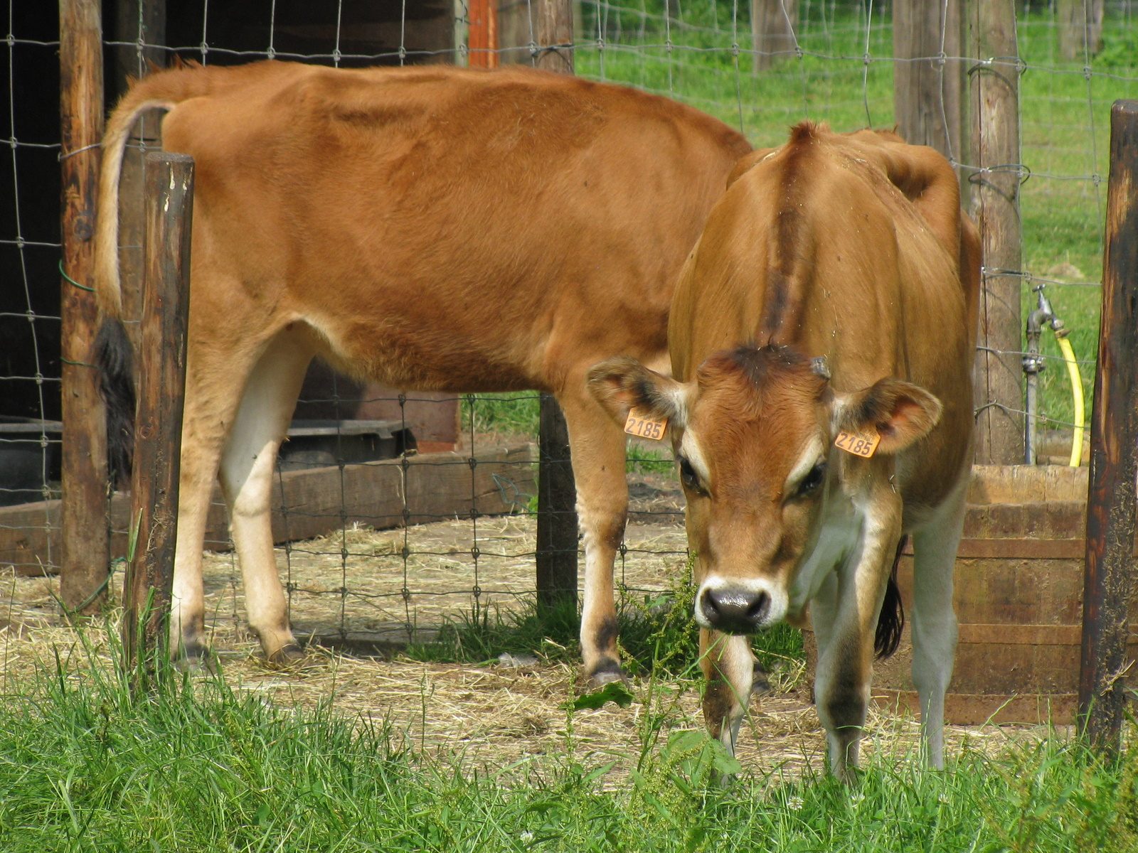 Donkmeer